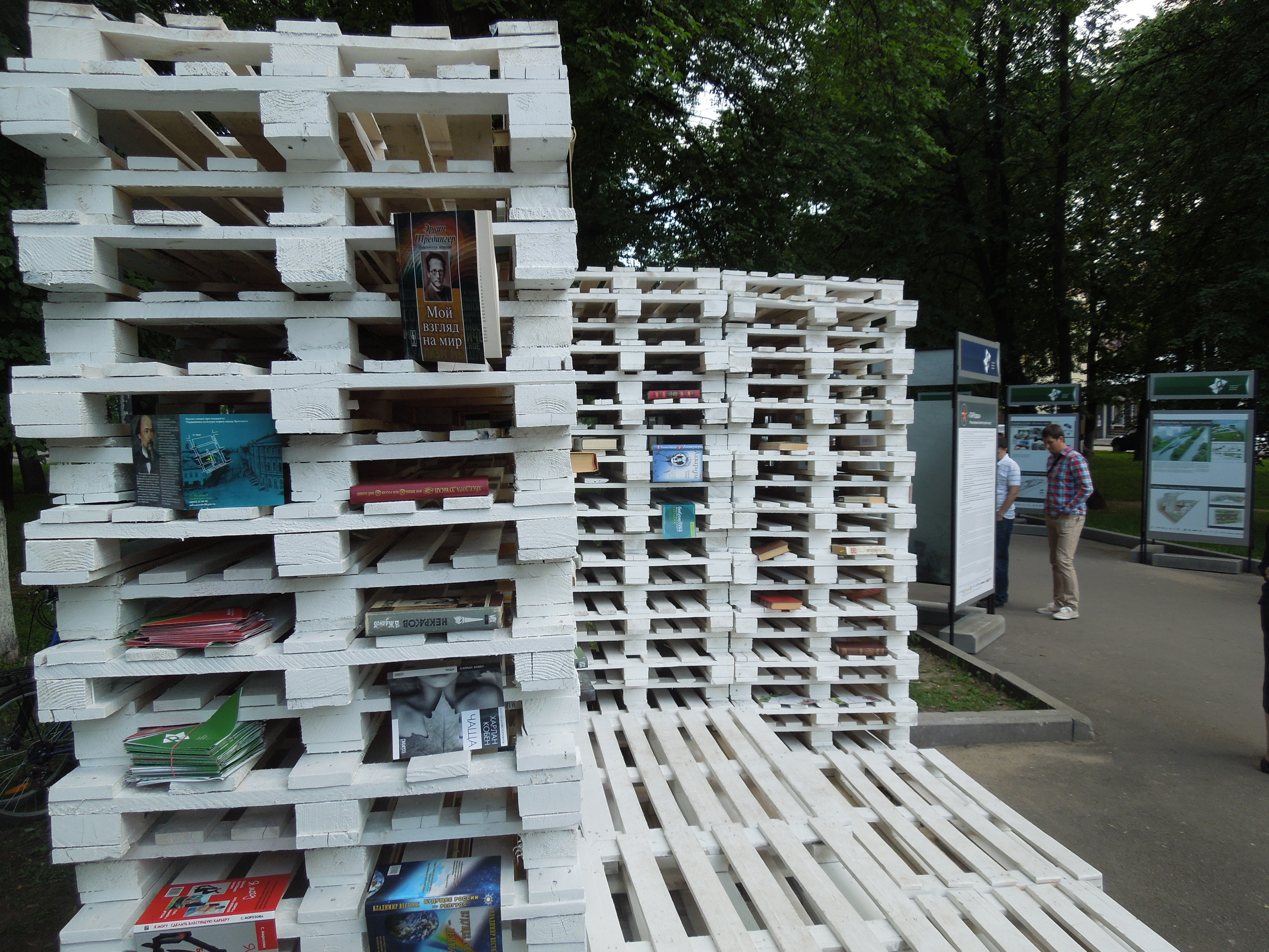 Архитектурный объект «Stack It» на бульваре Чайковского